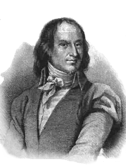 grafika z książki PL - Album biograficzne zasłużonych Polaków wieku XIX t.1 publikacja Marii Chełmońskiej Warszawa 1901